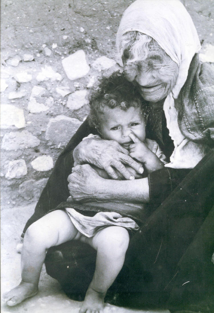 palestinian refugees 1948